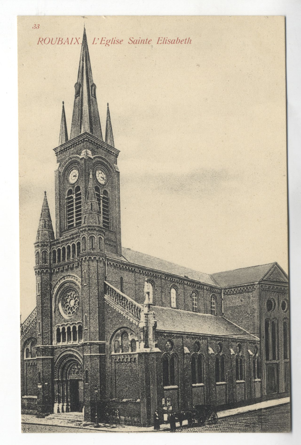 Carte postale ancienne de l'église Sainte-Élisabeth de Roubaix vers 1900.